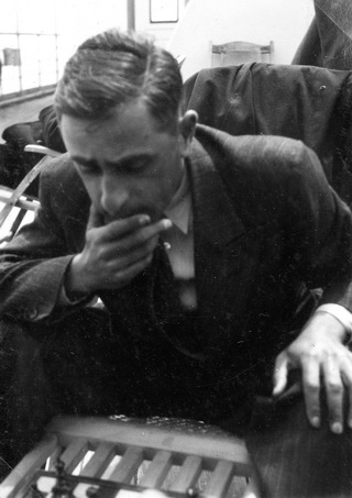 פנחס לובייניקר (לבון); 1935 - /דר דוד עופר